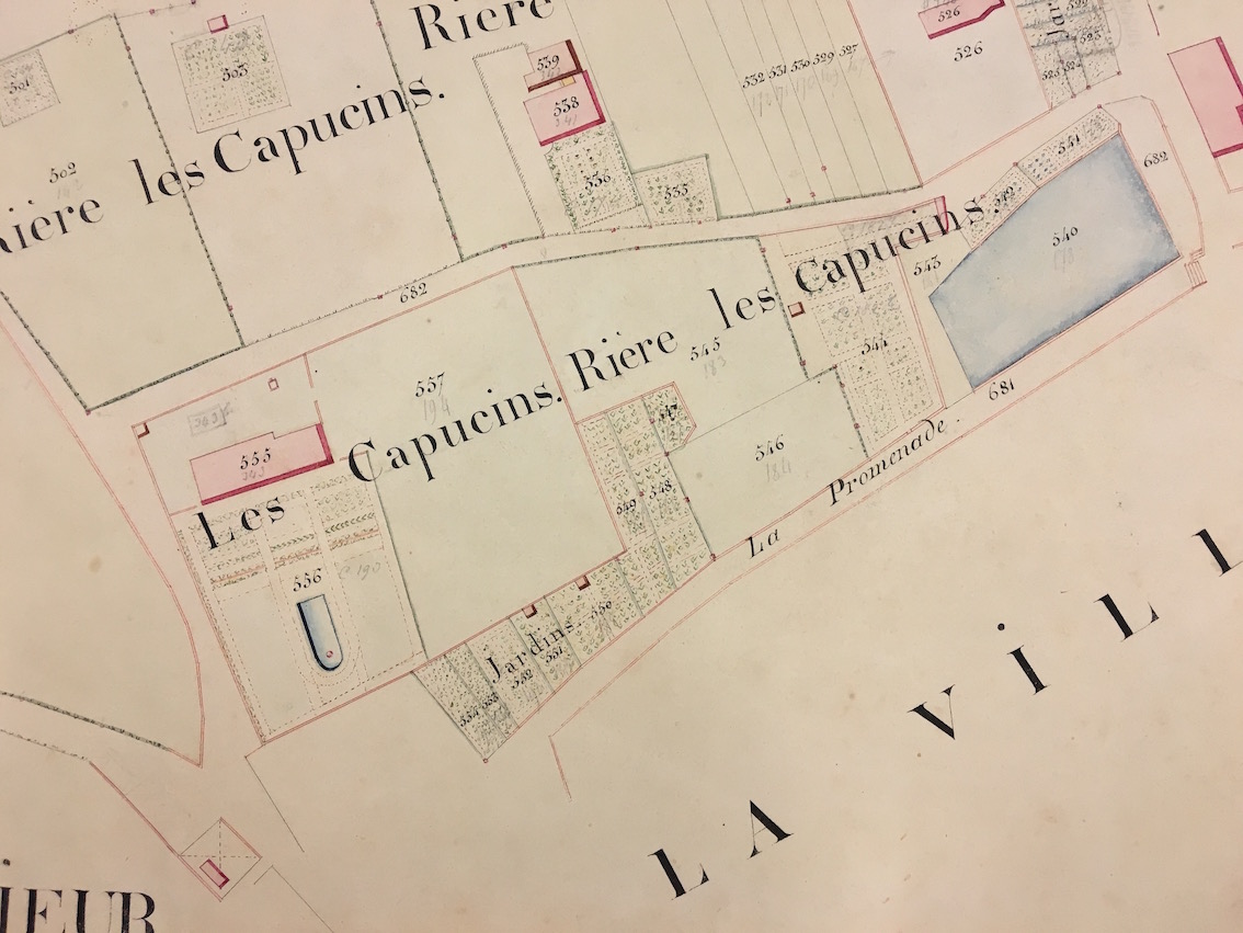 Photographie du plan cadastrale de 1826. Archives communales de Delémont